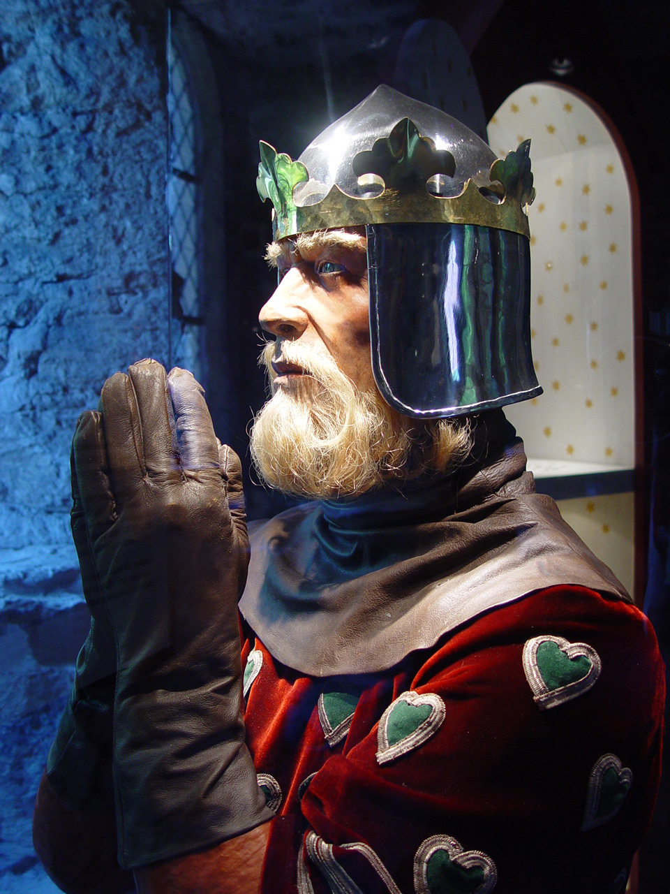 Kapitelhuset Visby: Waldemar IV Atterdag